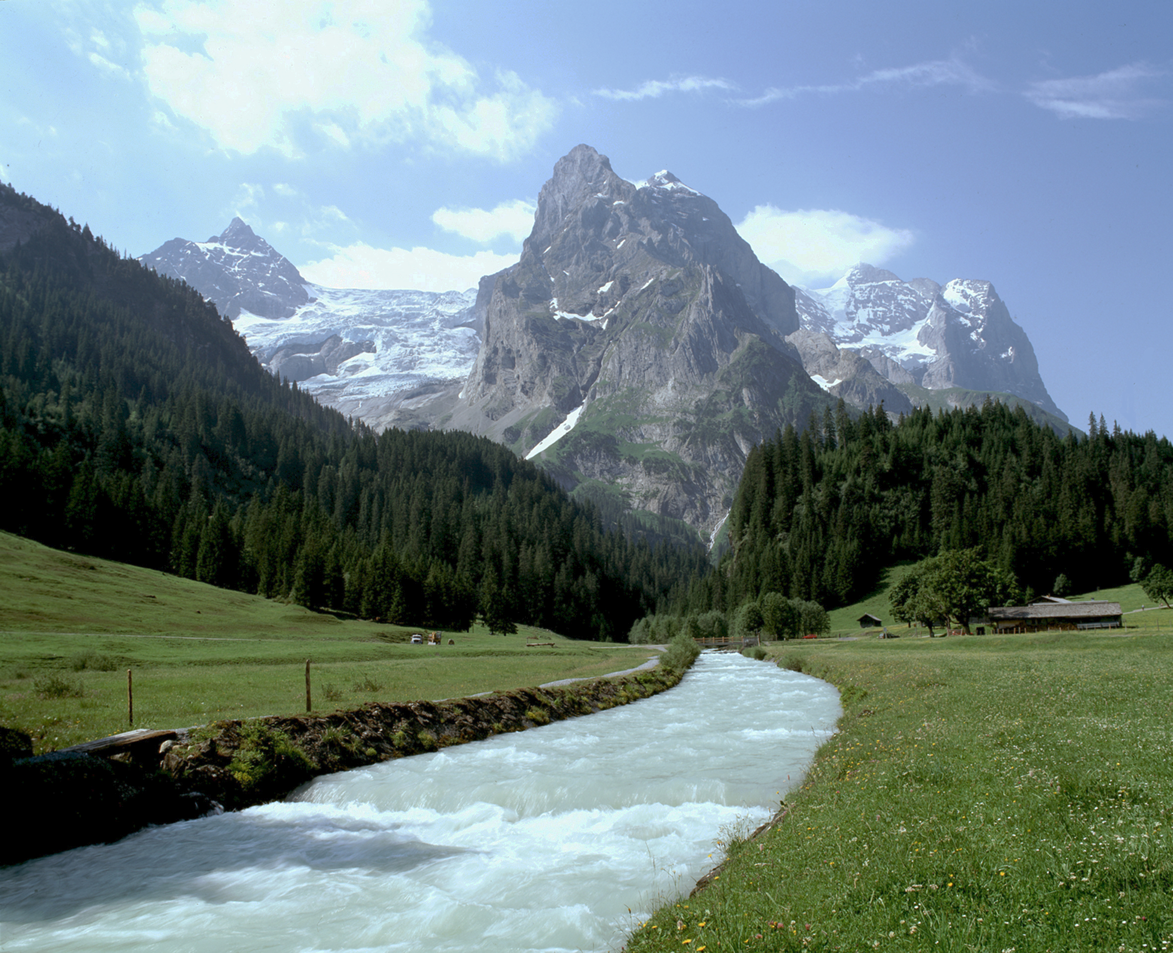 Das Rosenlauital erreicht man von Meiringen. Es liegt im Berner Oberland.